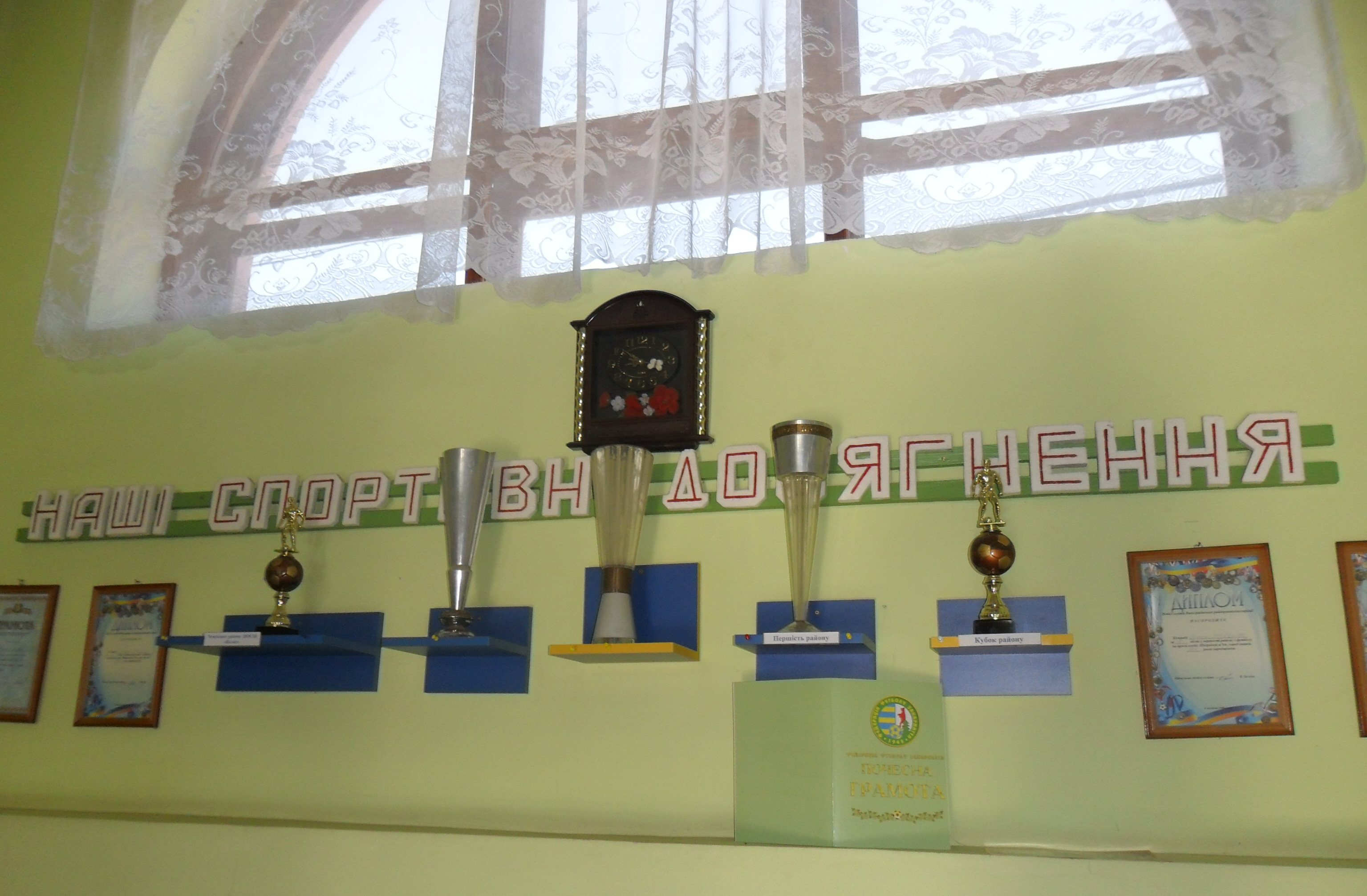 A Tiszaújlaki 2. Sz. Középiskola diákjainak győzelmi serlegei, Kárpátalja, Ukrajna